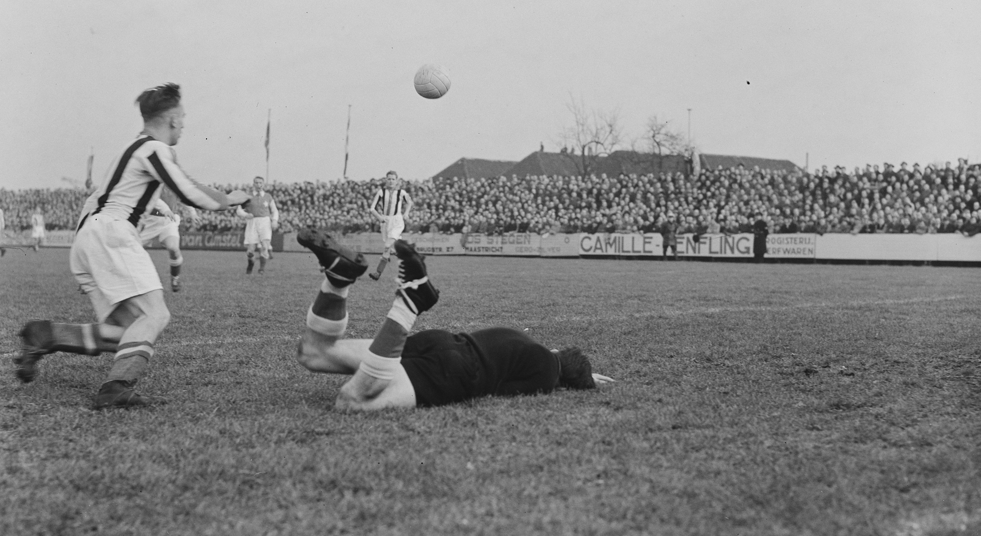 Collectie / Archief : Fotocollectie Anefo Reportage / Serie : [ onbekend ] Beschrijving : Voetbal. MVV tegen Willem II (0-0). Spelmoment Datum : 6 januari 1952 Locatie : Maastricht Trefwoorden : voetbal Instellingsnaam : Willem II Fotograaf : Pot, Harry / Anefo Auteursrechthebbende : Nationaal Archief Materiaalsoort : Glasnegatief Nummer archiefinventaris : bekijk toegang 2.24.01.09 Bestanddeelnummer : 904-9129